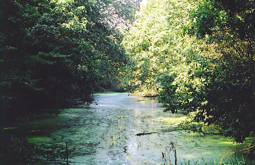 Ourthekanaal, kanaalpand bij Bernistape - eigen foto